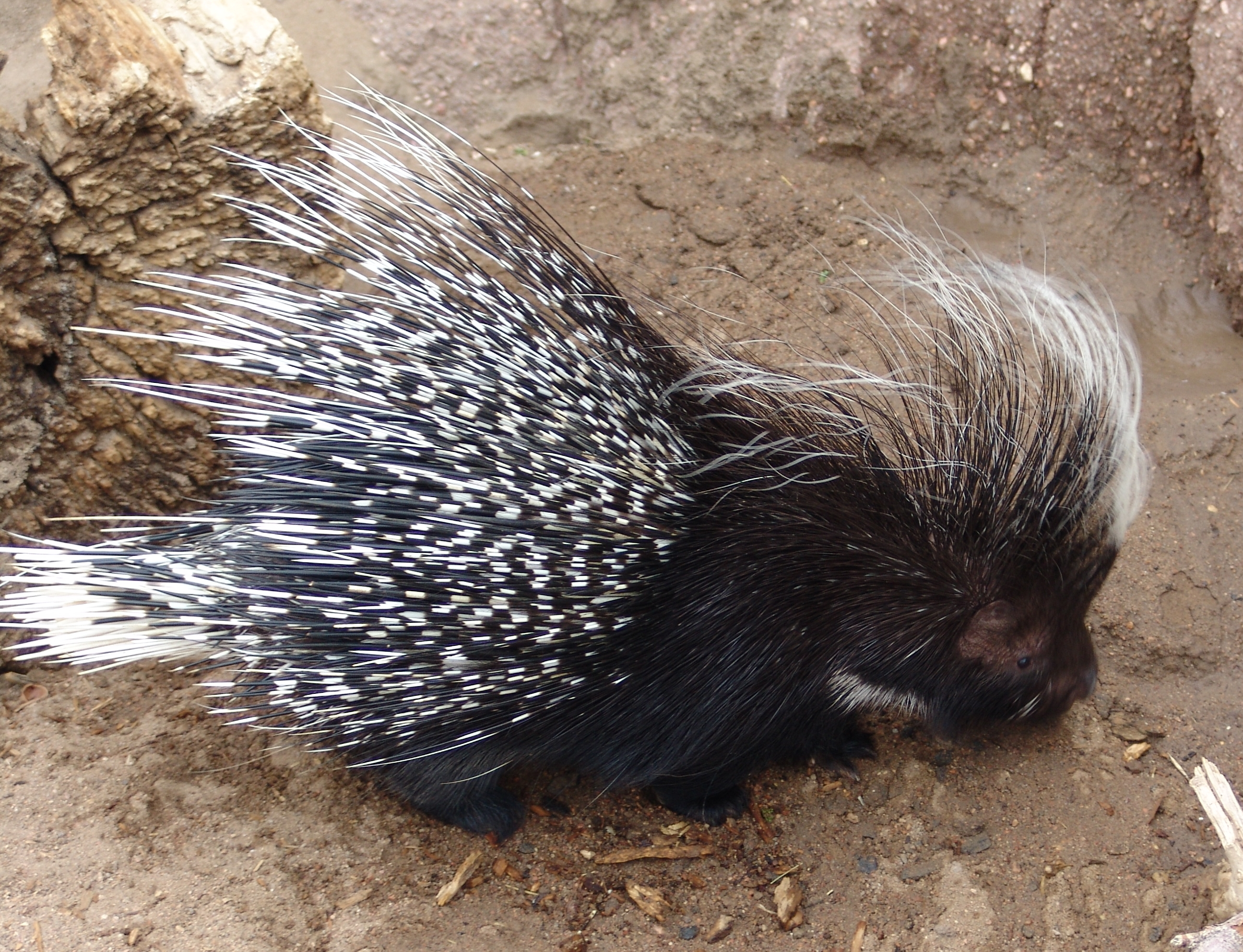 Denver Zoo